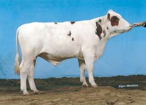 Salvo